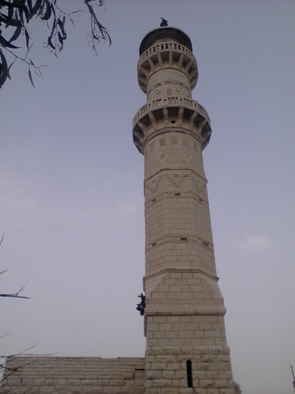 المسجد الكبير بيت فجار